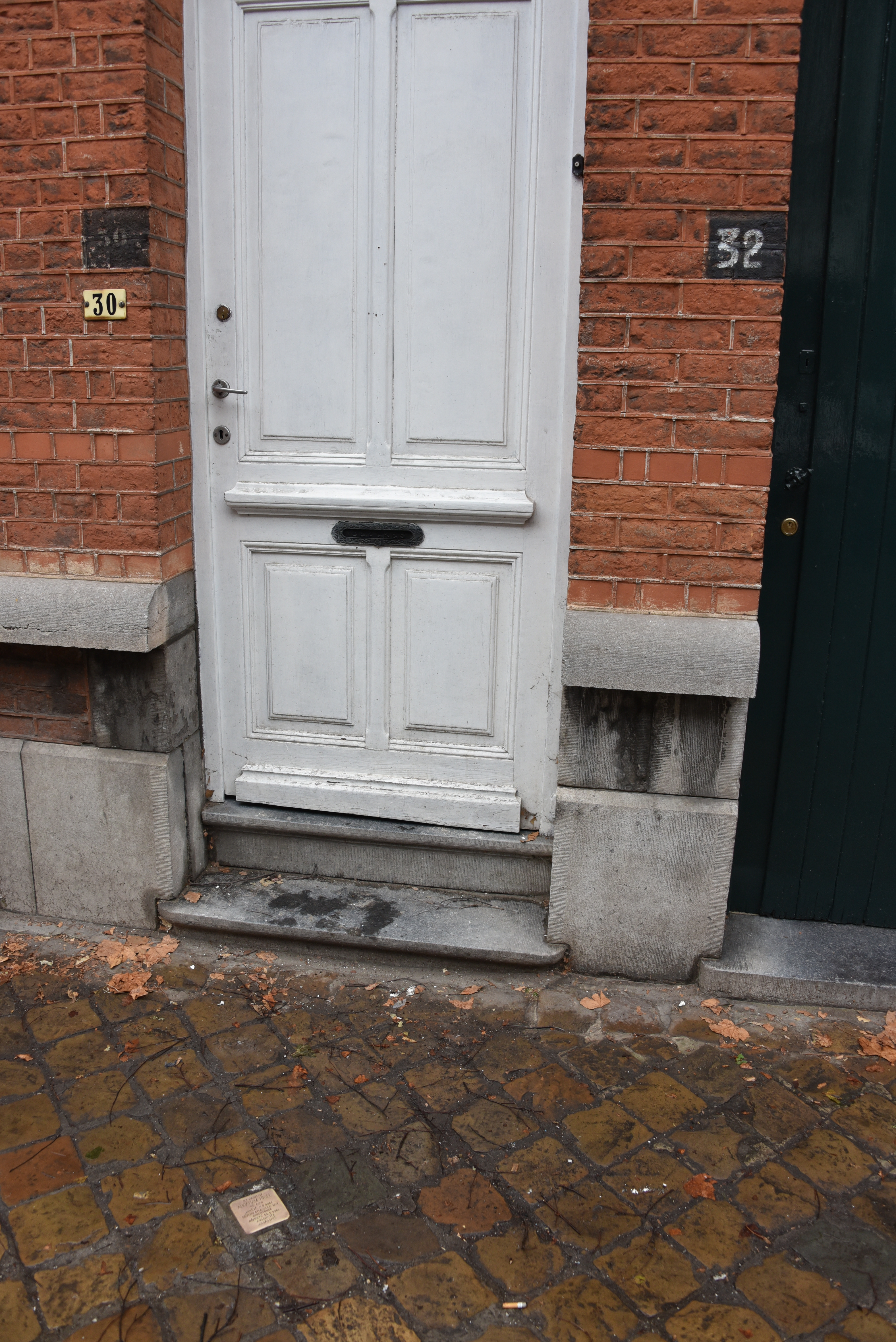 Stolperstein in Charleroi